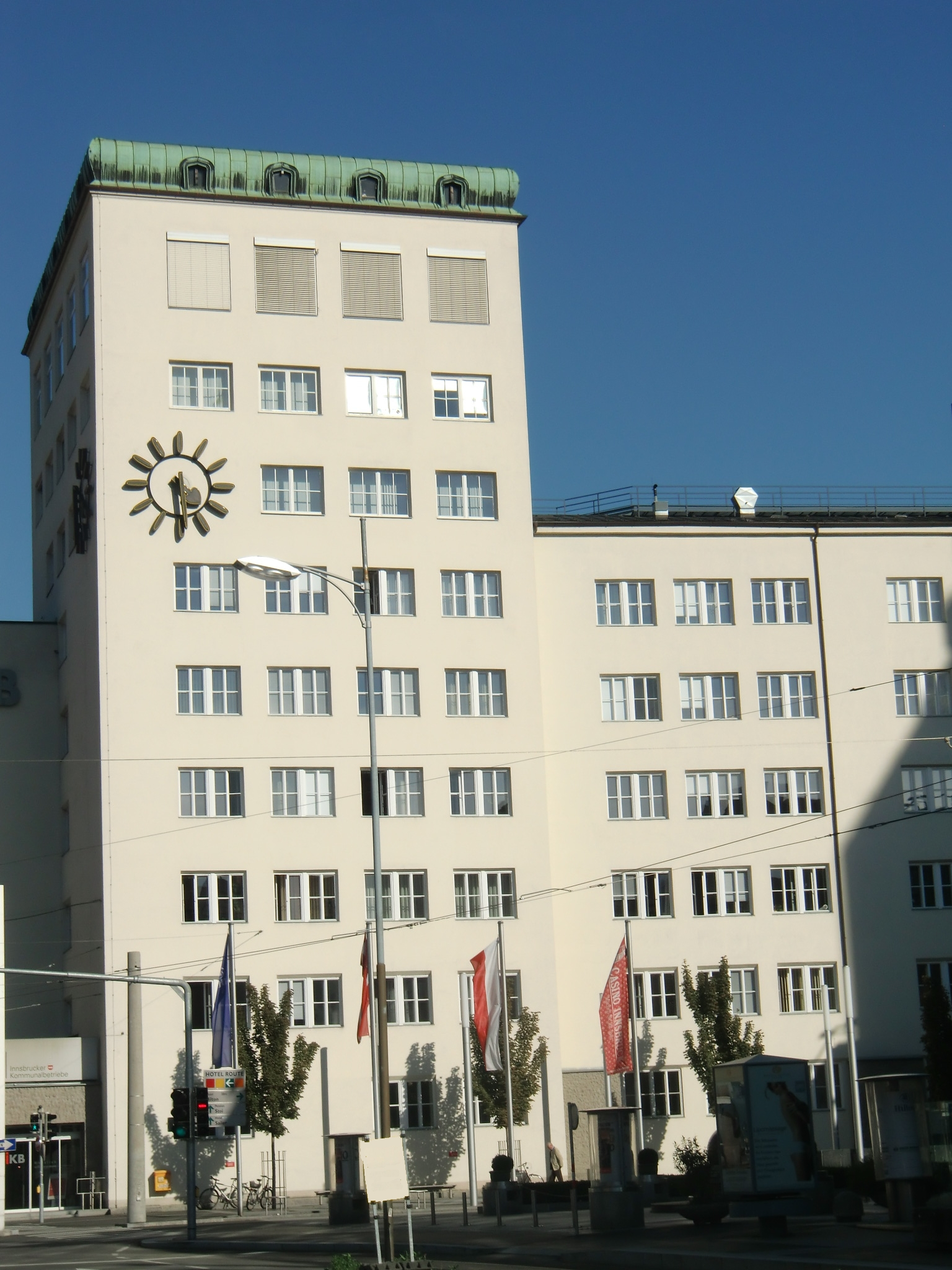 Stadtwerke-Hochhaus